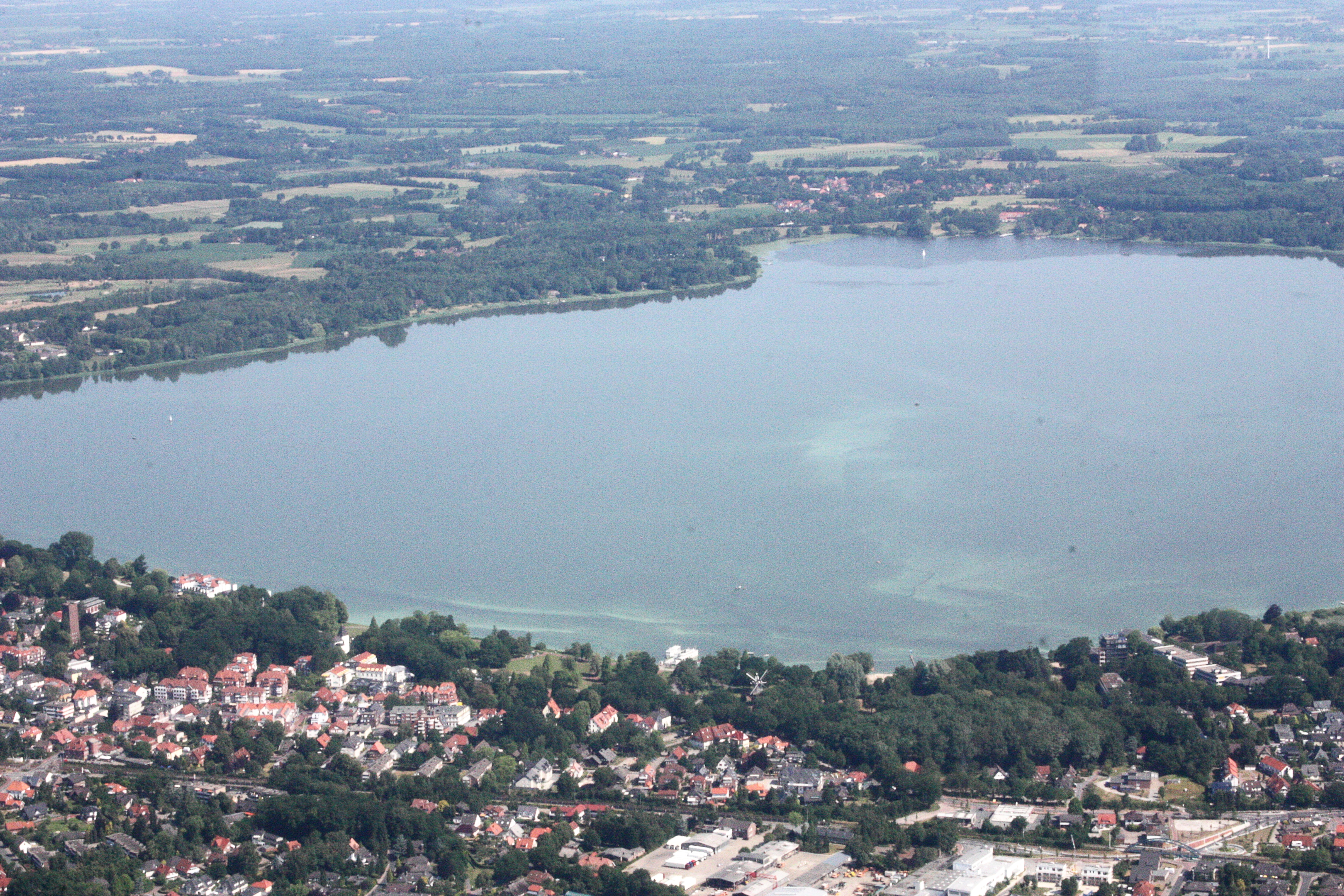 Flug von Oldenburg (Oldenburg) nach Bad Zwischenahn und zur Landesgartenschau ; Flughöhe 1500 ft; Juli 2010; Originalfoto bearbeitet: Tonwertkorrektur und Bild geschärft mit Hochpassfilter